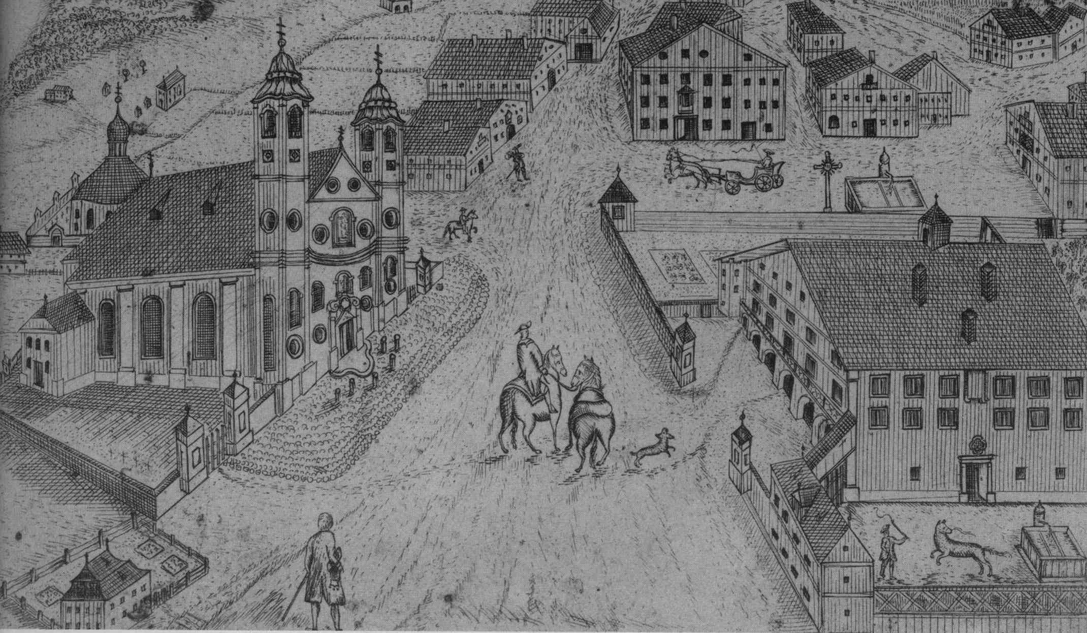 Ortsansicht 1750 St. Johann in Tirol, Kupferstich um 1750